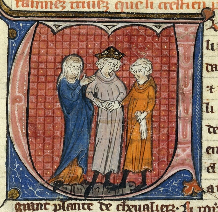 Mariage d'Onfroi IV de Toron et d'Isabelle de Jérusalem